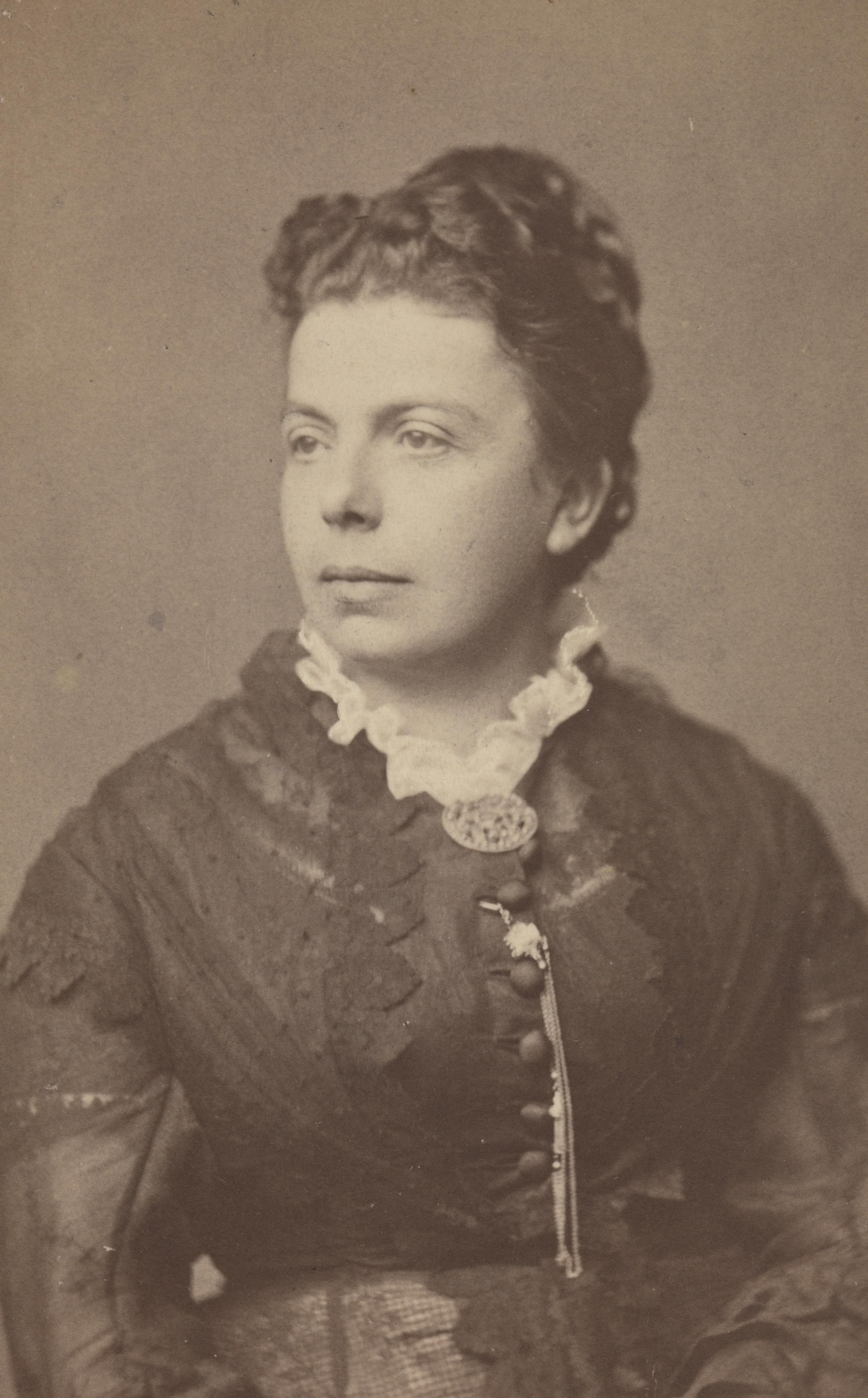 Bildet er hentet fra Nasjonalbibliotekets bildesamling Depicted person: Ibsen, Suzannah